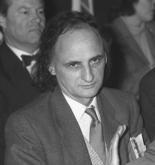 Poetul Grigore Vieru la spectacolul Reculegere sub semnul lui Eminescu (Ateneul Român), 1990